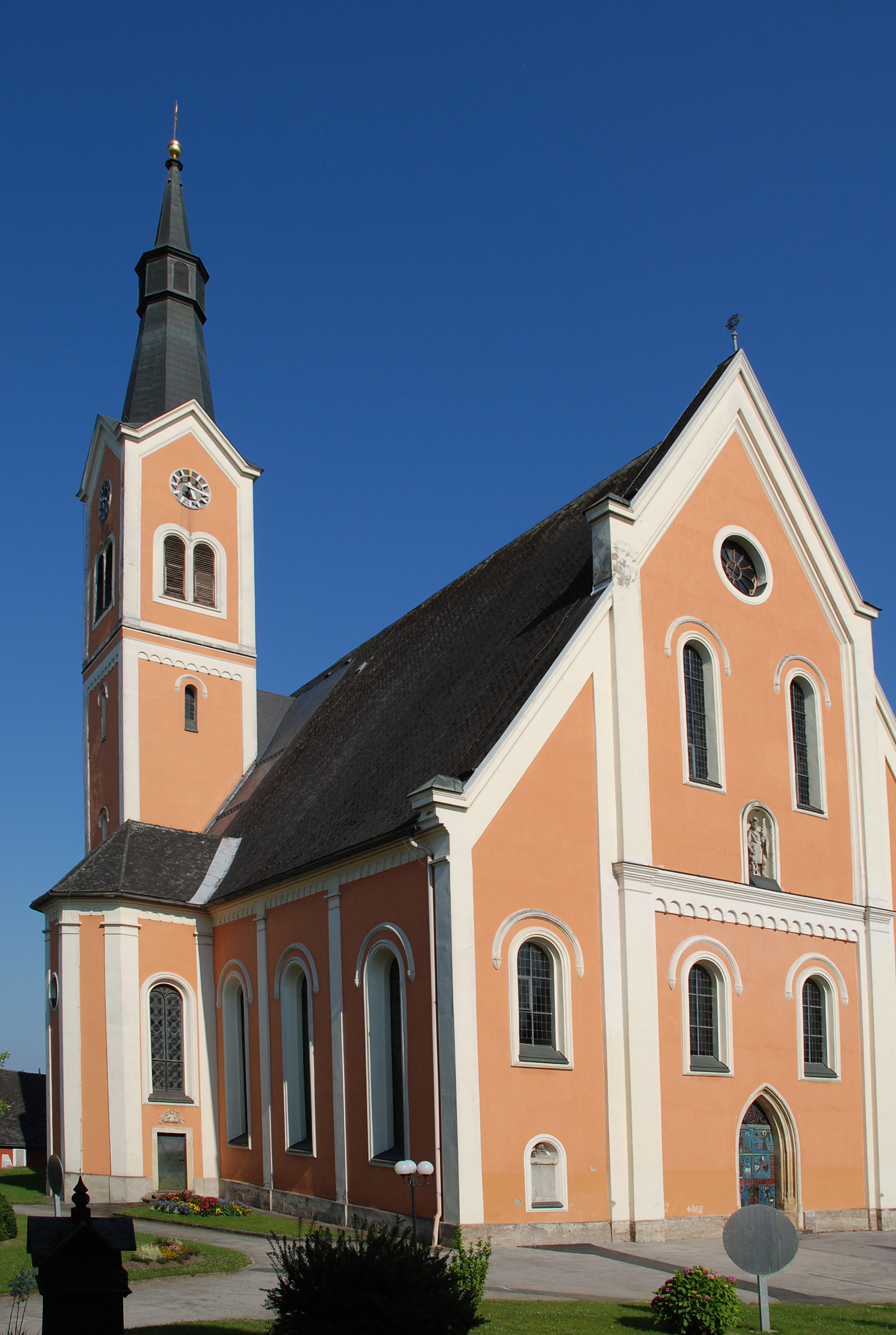 Groß Sankt Florian, Steiermark, Österreich: Kirche - bis in das 18. Jahrhundert Sitz des Archidiakons bzw. Kommissars des Bistums Lavant für dessen Bereich in der Weststeiermark.